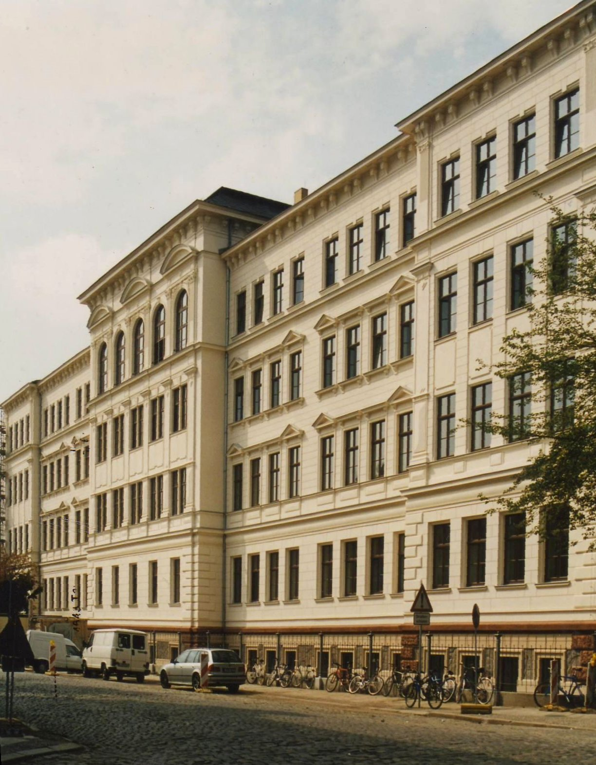 Gebäude der Leipziger Thomasschule in der Hillerstraße.